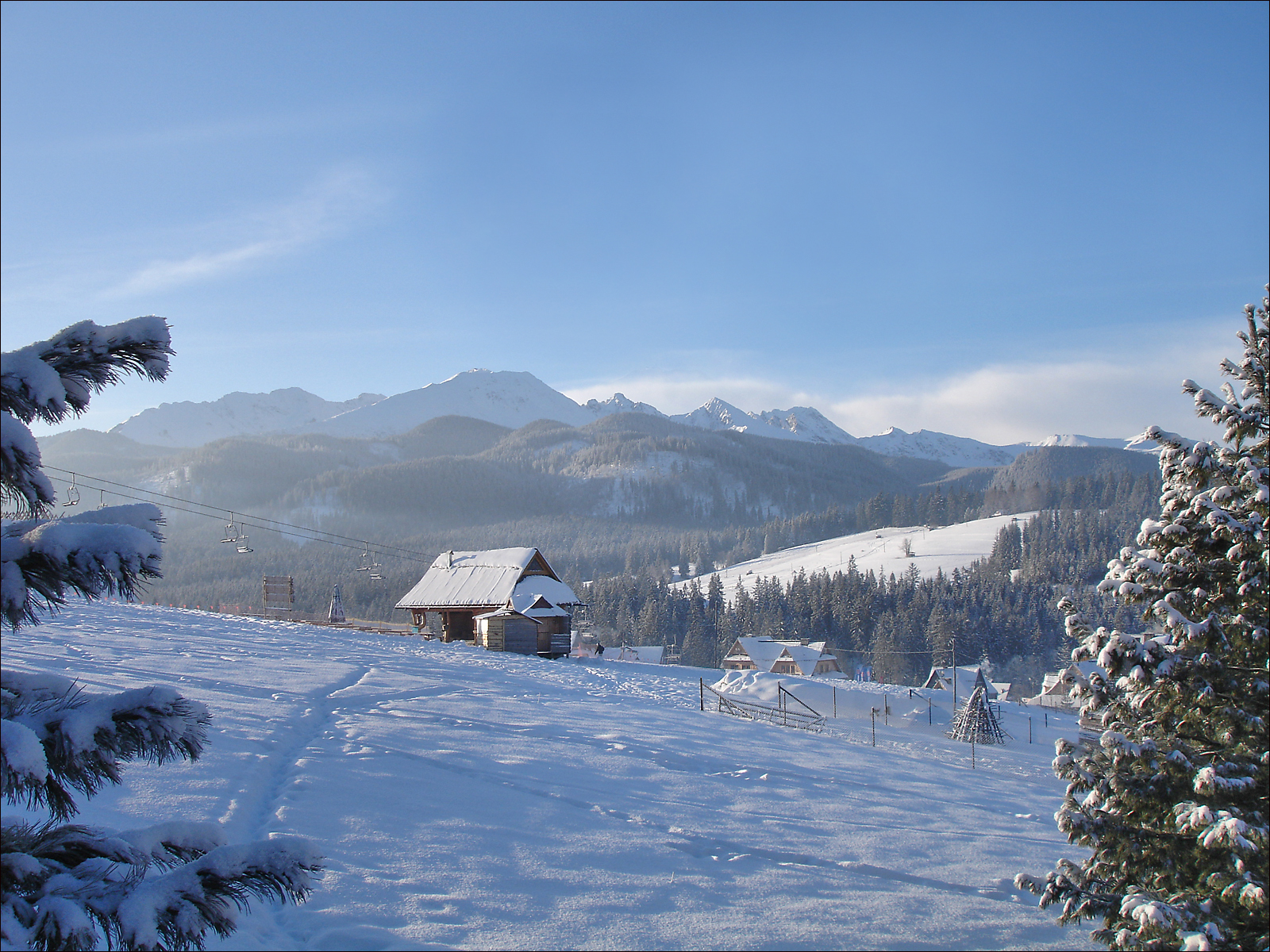 Małe Ciche zima